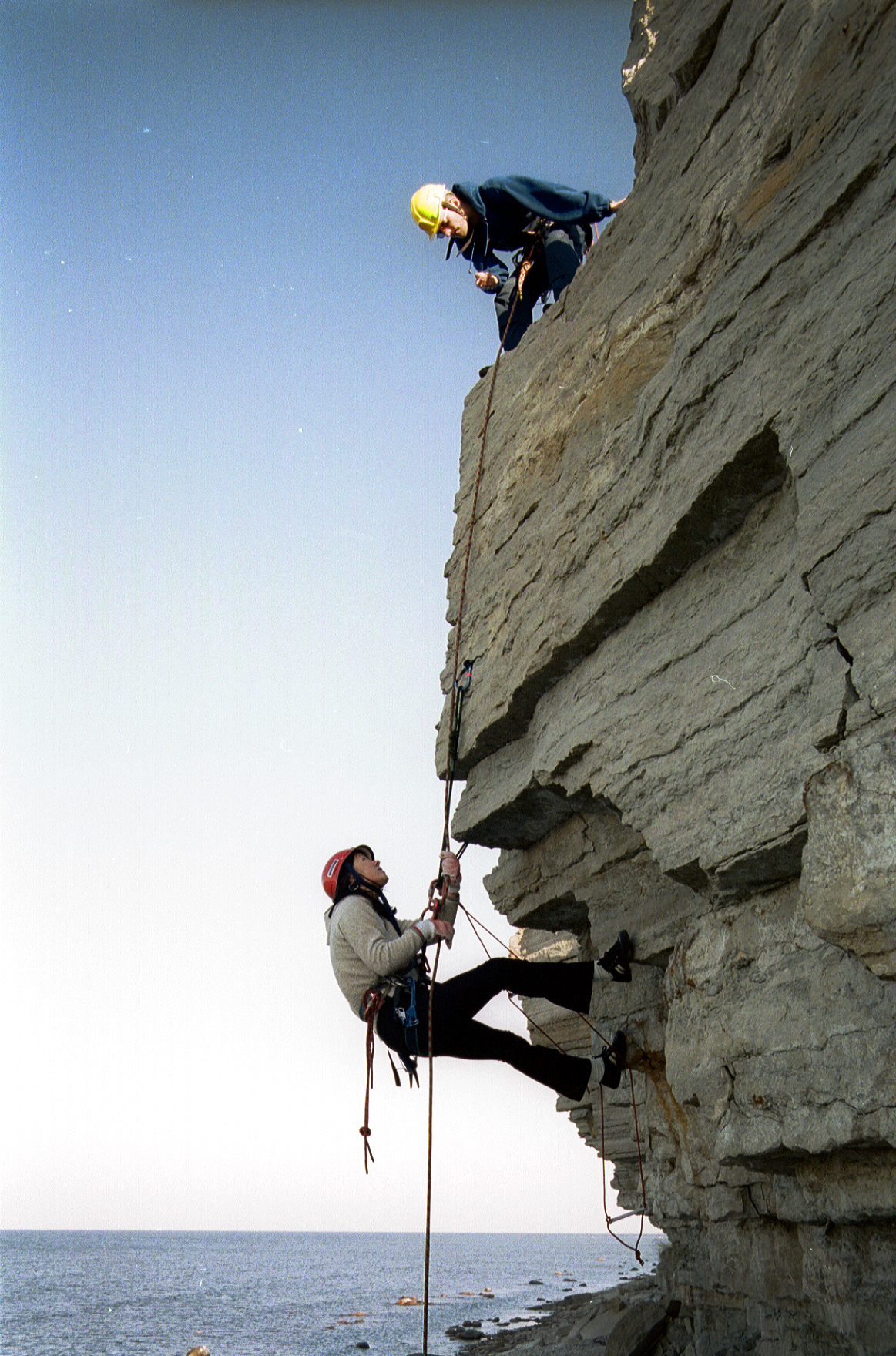 Alpinistide treening Paldiski pangal